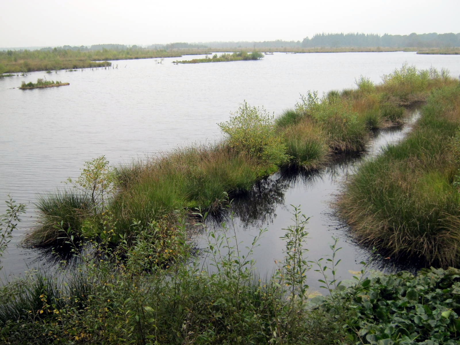 Naturschutzgebiet Fockbeker Moor im September 2017